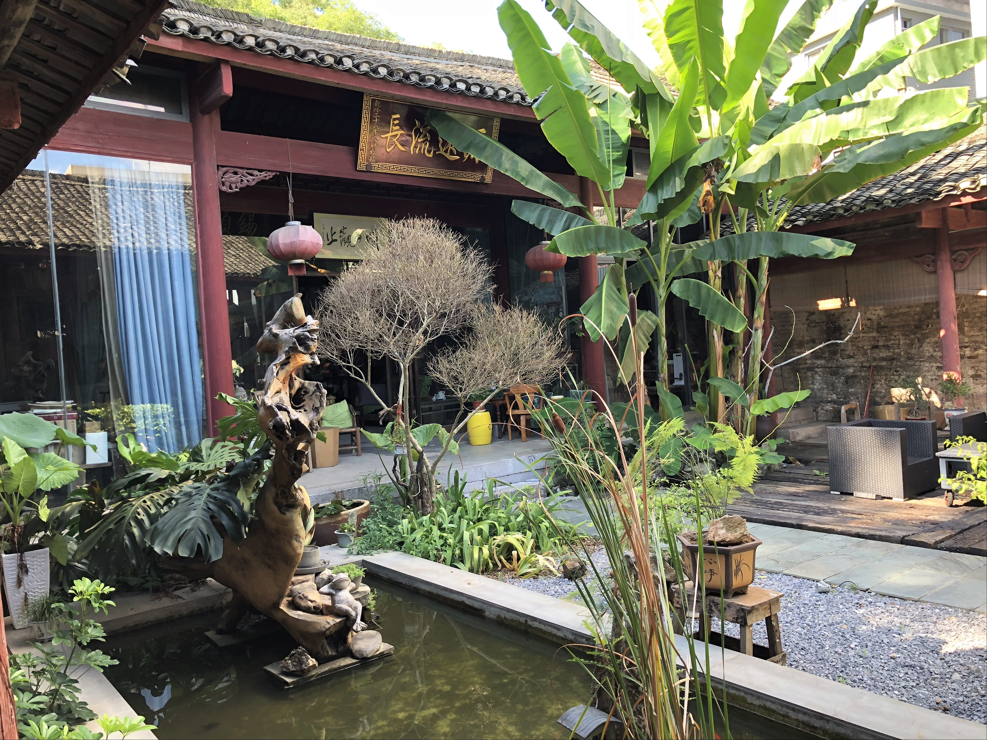 冷氏宗祠 第三进及与第二进之间的院落